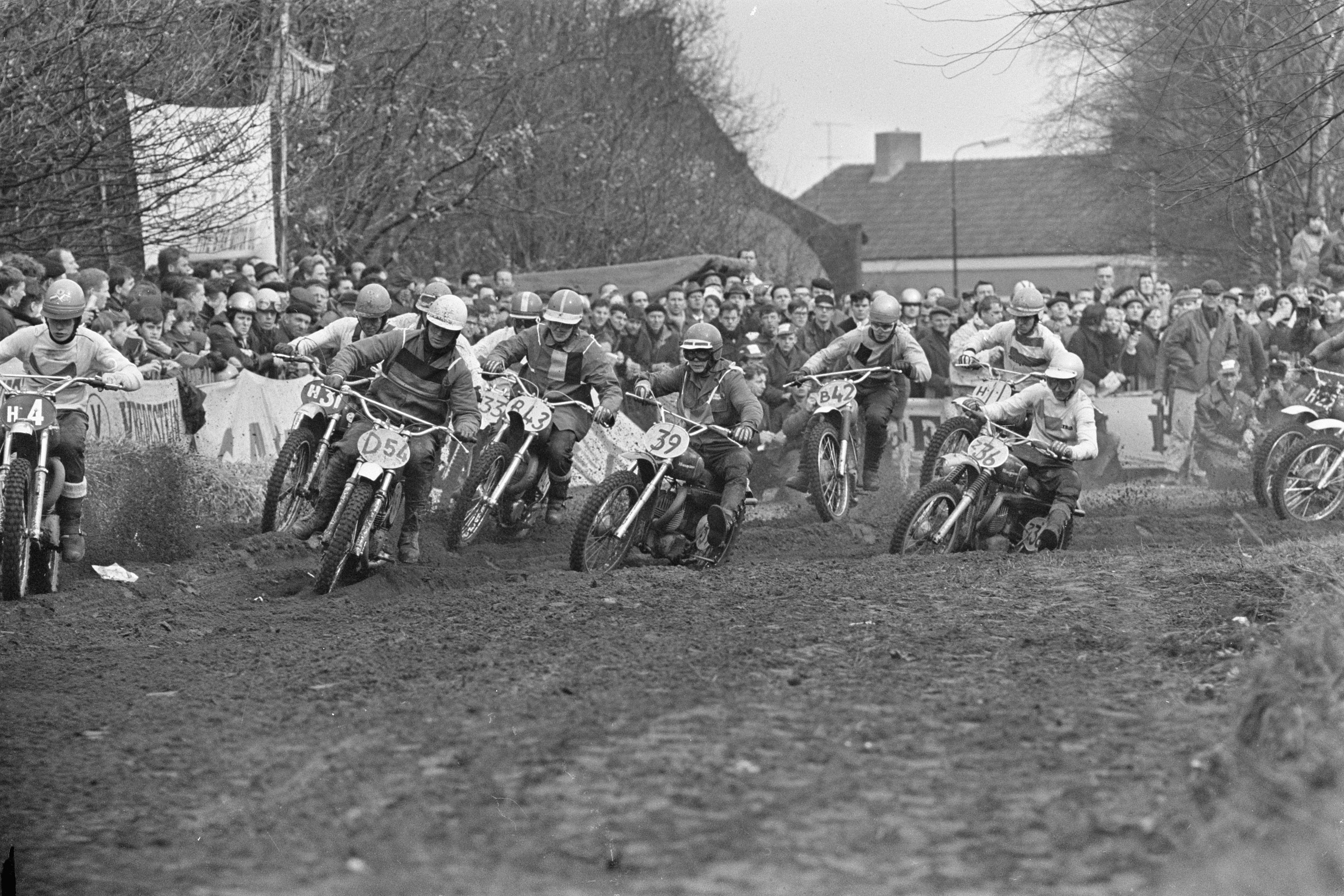 Collectie / Archief : Fotocollectie Anefo Reportage / Serie : [ onbekend ] Beschrijving : Motorcross St. Anthonis start 350 cc Datum : 19 maart 1967 Trefwoorden : MOTORCROSS Fotograaf : Koch, Eric / Anefo Auteursrechthebbende : Nationaal Archief Materiaalsoort : Negatief (zwart/wit) Nummer archiefinventaris : bekijk toegang 2.24.01.05 Bestanddeelnummer : 920-1727 Reacties Geplaatst door wieb van de pol op 26 mei 2011 - 20:33. 4 is frans sigmans,31 is frits selling 33 is pierre karsmakers,42 sylvain geboers,11 is jo lammers,36 torsten hallman,tussen selling en karsmakers is ton van heugten met de bril op de helm